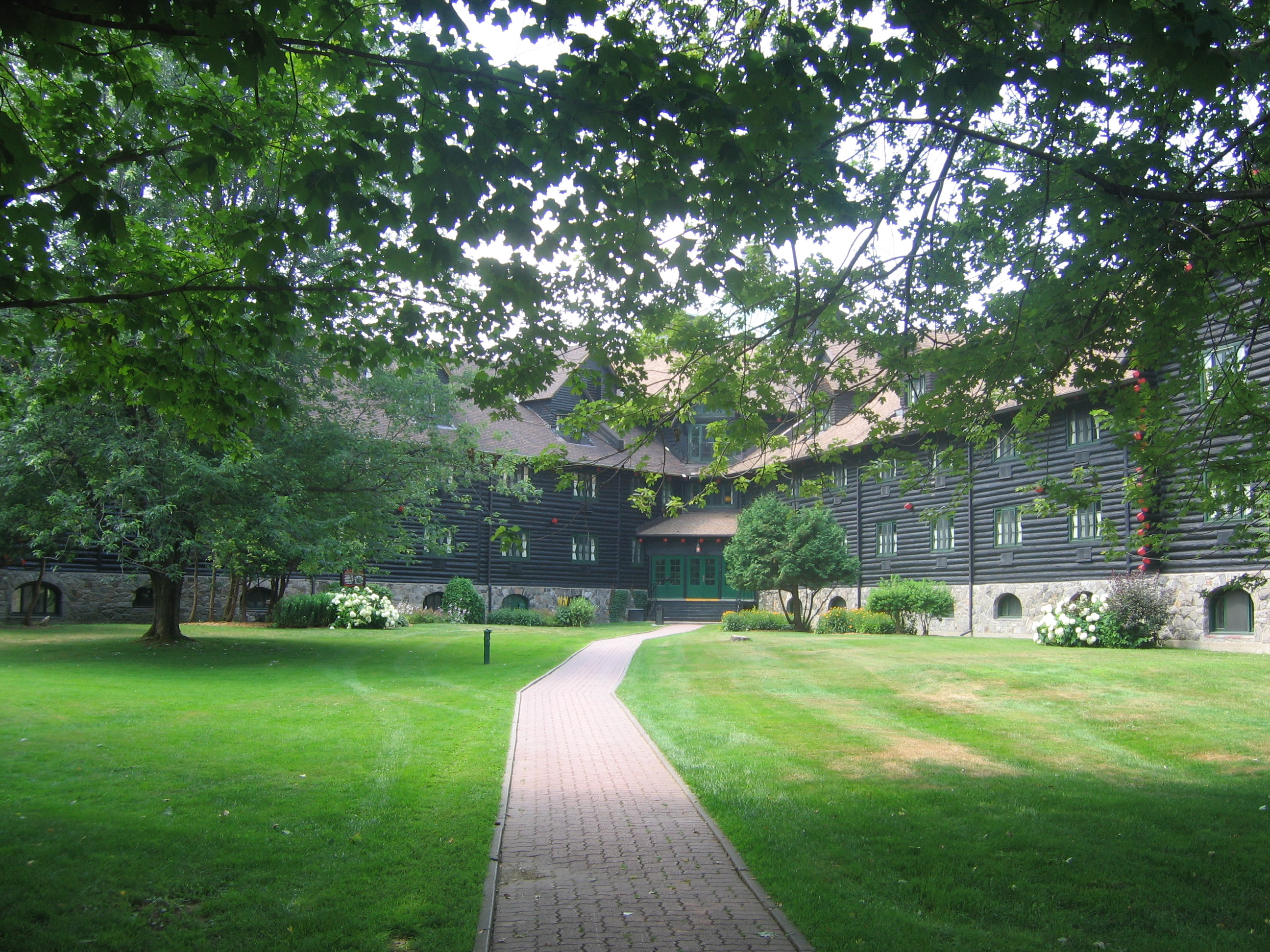 Le château Montebello au Québec, juillet 2007